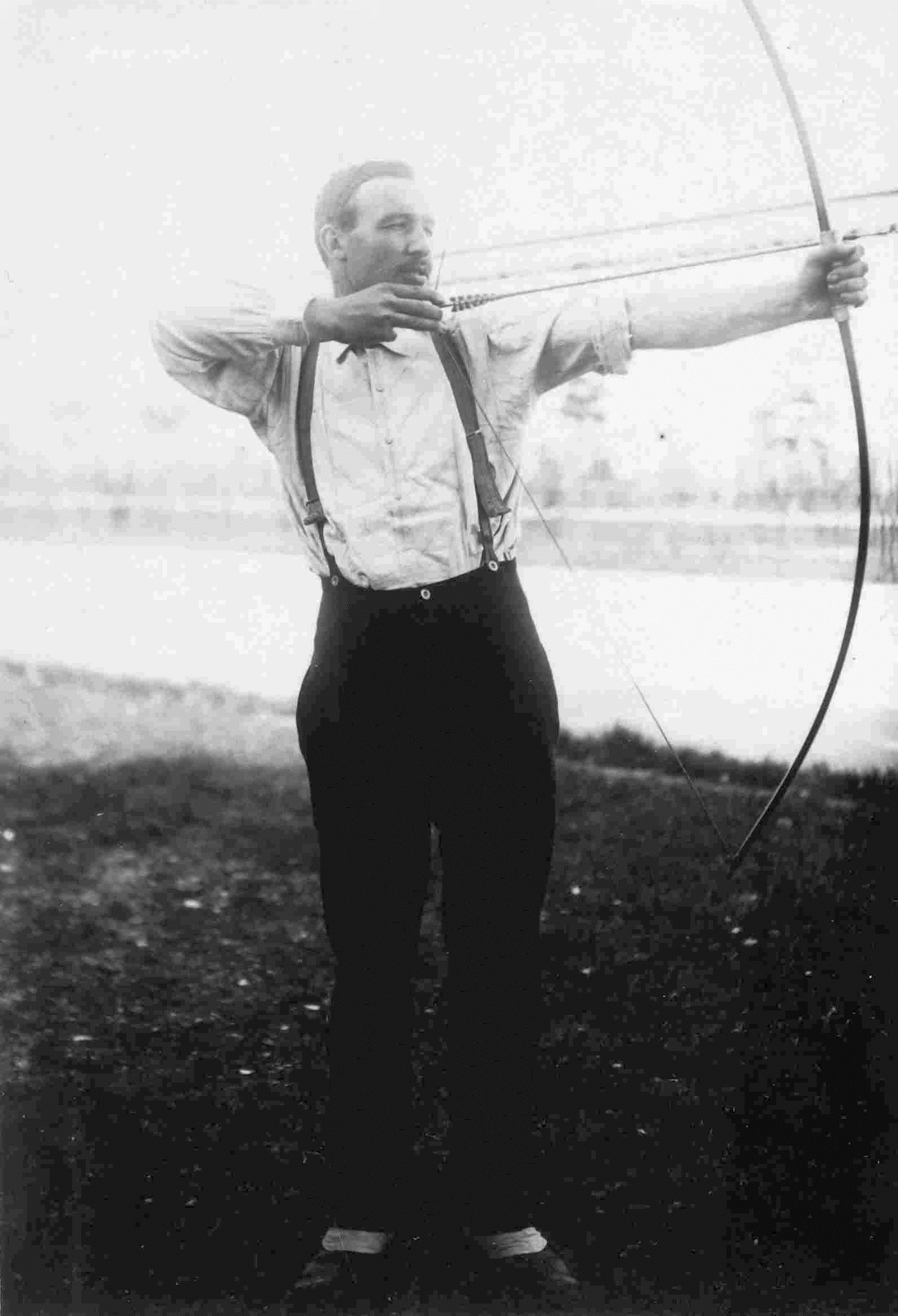 [Collection Jules Beau. Photographie sportive] : T. 12. Années 1899 et 1900 / Jules Beau : F. 8v. [Les sports à l' Exposition : tir à l' arc] ; Hérouin fils